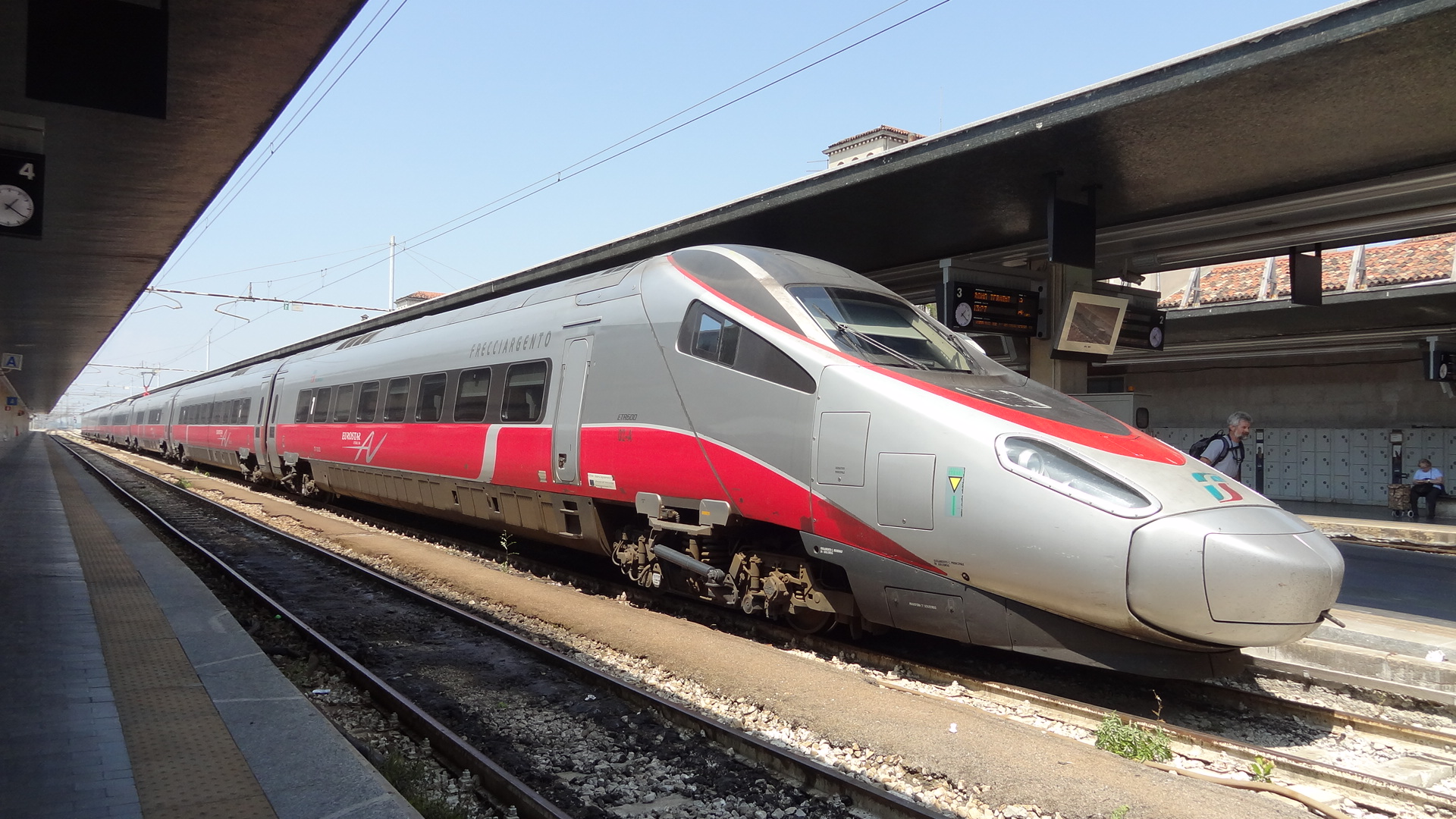 ETR600 Frecciargento ヴェネツィア サンタルチア駅にて撮影